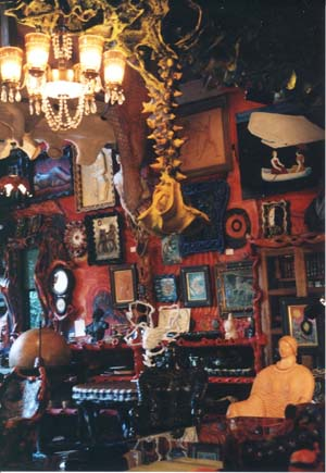 石丸美術館の内部・酔鯨館。石丸雅通氏アトリエ。 Ishimaru Musium, Suigeikan, by Ishimaru Masamichi.